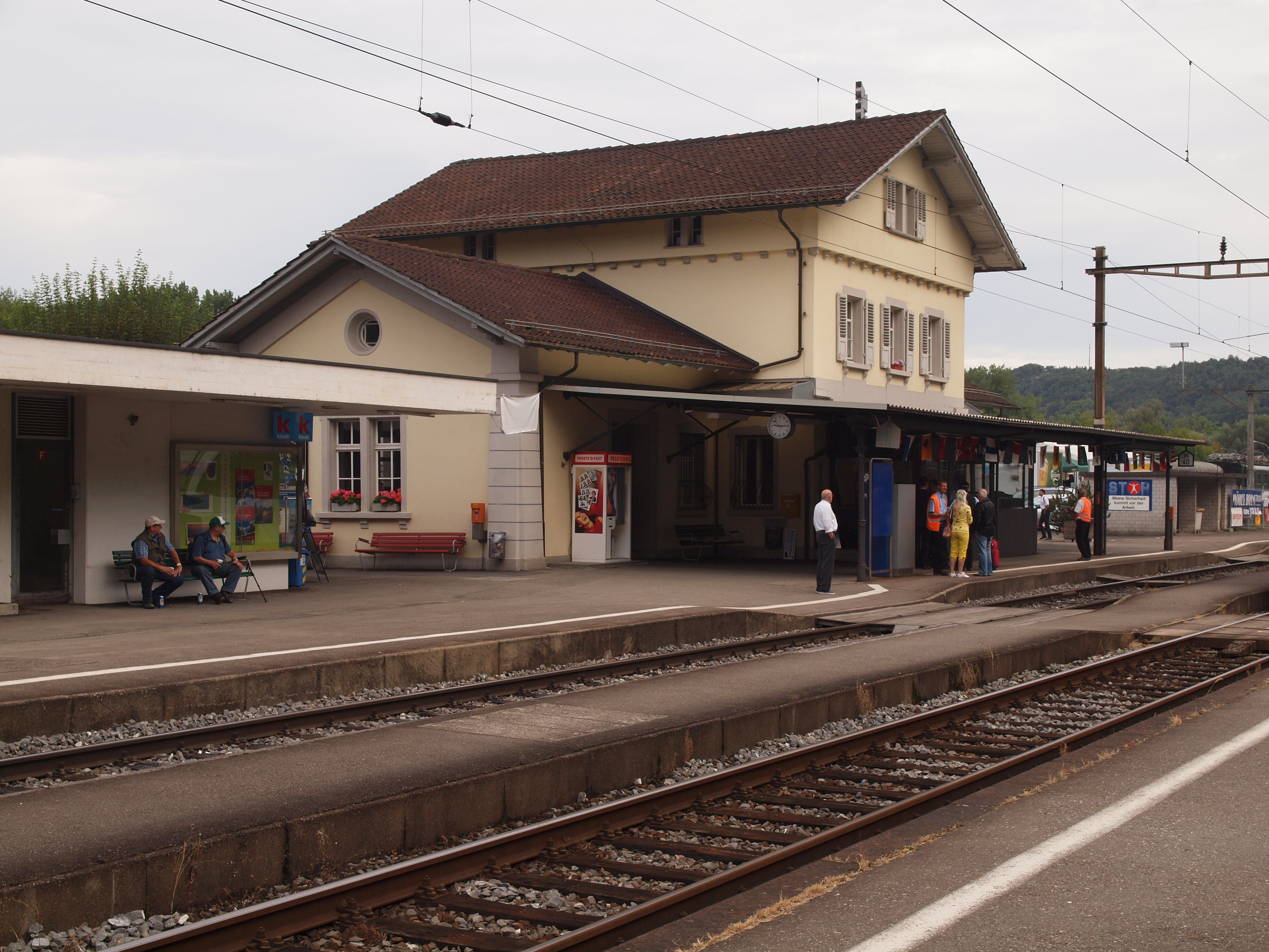 Das Aufnahmegebäude des Bahnhof Koblenz, in der Schweiz